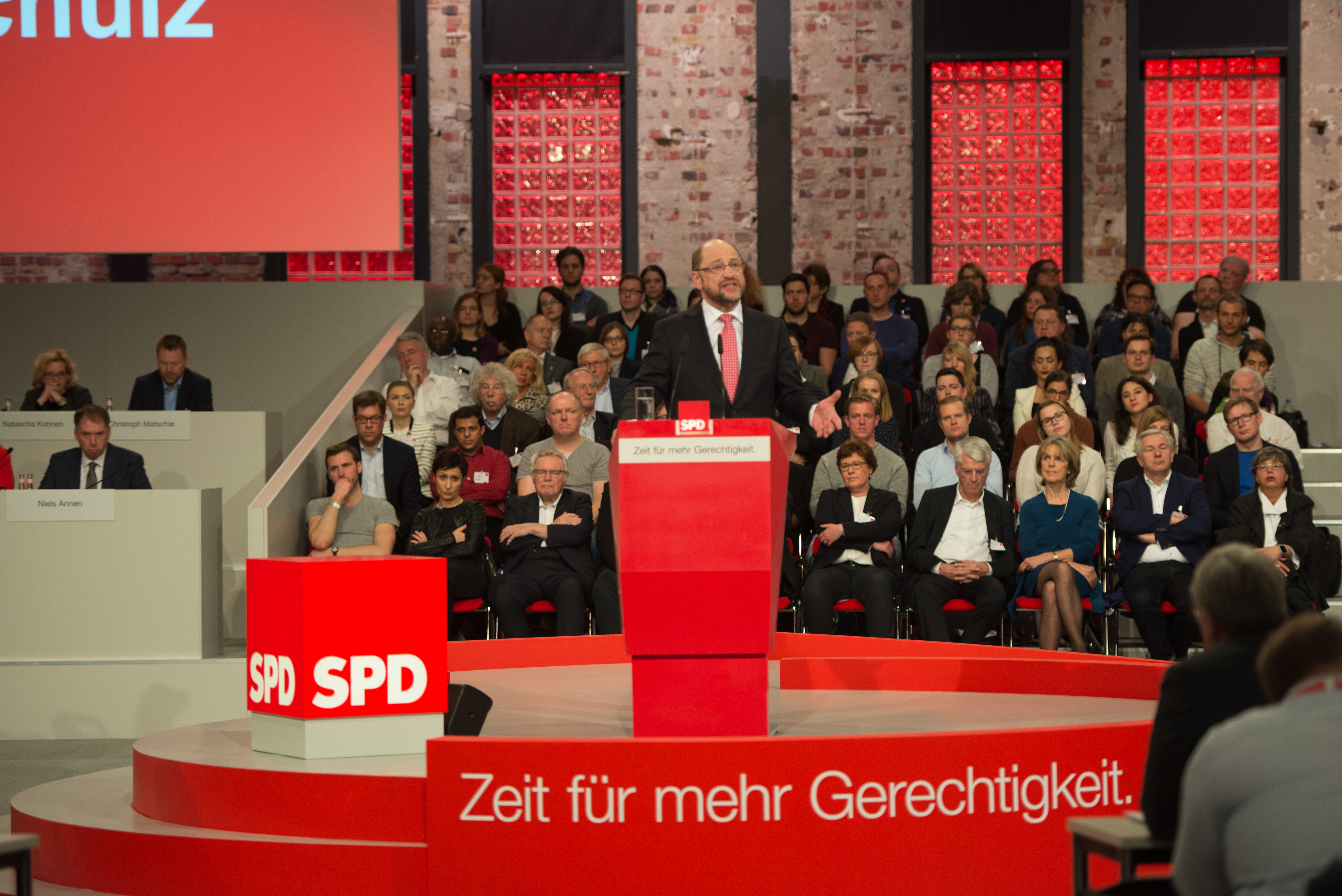 Martin Schulz auf dem SPD Bundesparteitag am 19. März 2017 in Berlin